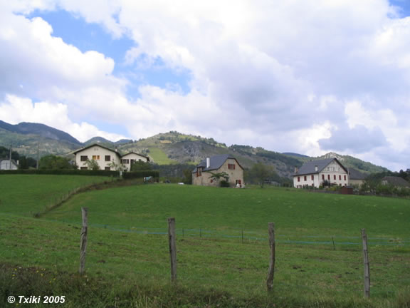 Village de Charritte-de-Haut (Pyrénées Atlantiques Pyrénées).